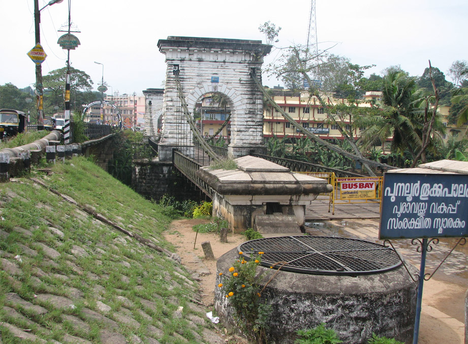 Punalur Bridge